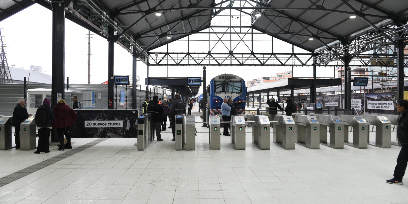 Hall de Retiro San Martín durante la reconstrucción de 2019